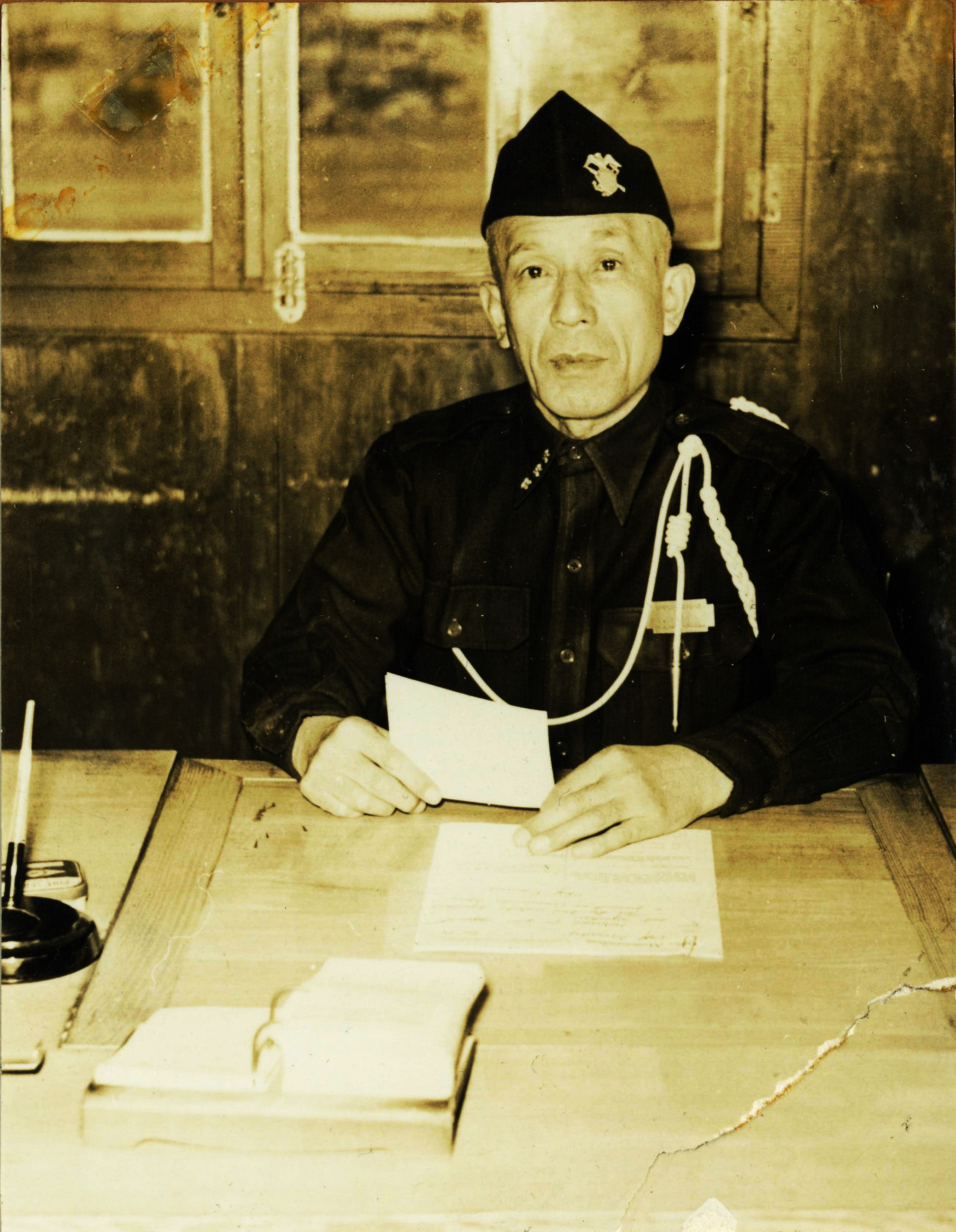 米海軍横須賀基地警備隊長（初代） 鹿目善輔